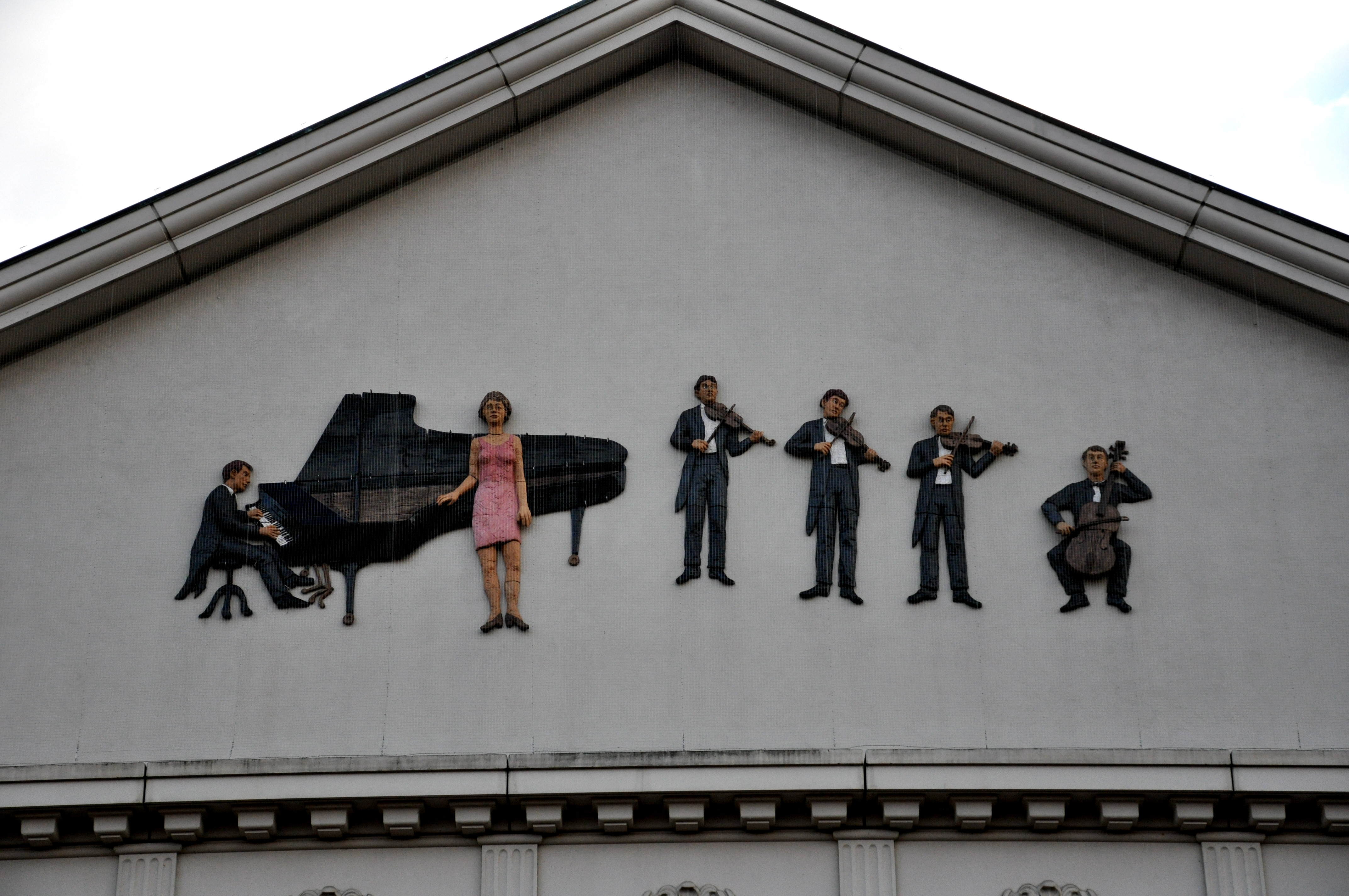 Karlsruhe, Konzerthaus, Giebel mit Relief von Stephan Balkenhol (1996)